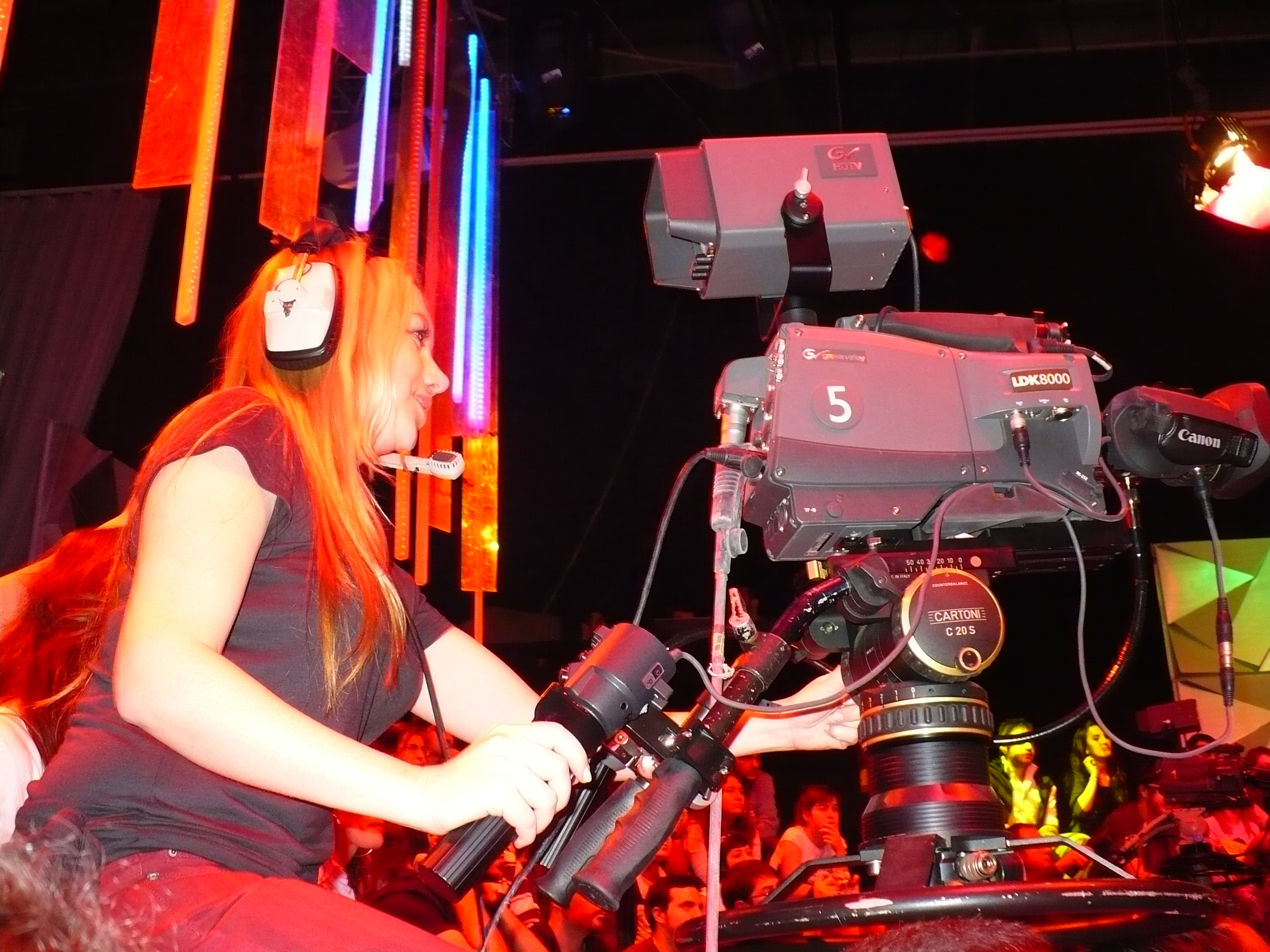 Türk kameraman